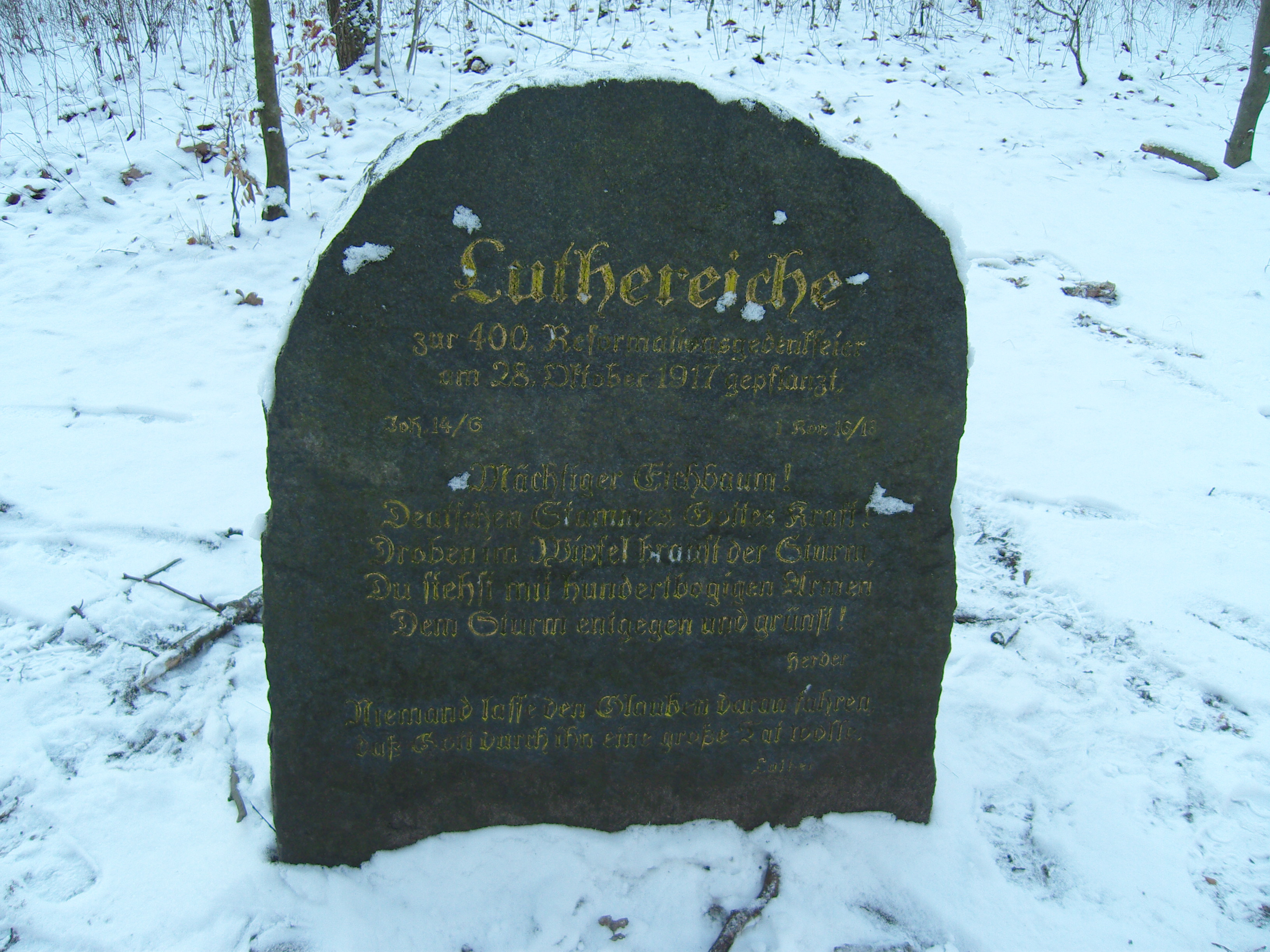 Gedenkstein zum Setzen der Luthereiche in der Dresdner Heide Inschrift: Luthereichezur 400. Reformationsgedenkfeieram 28.Oktober 1917 gepflanzt. Joh. 14/6 1 Kor. 16/18 Mächtiger Eichbaum!Deutschen Stammes. Gottes Kraft!Droben im Wipfel braust der Sturm,Du siehst mit hundertbogigen ArmenDem Sturm entgegen und grünst! Herder Niemand lasse den Glauben daran fahren, daß Gott durch ihn eine große Tat wolle. Luther